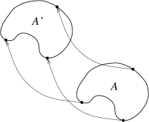 Skica translacije.